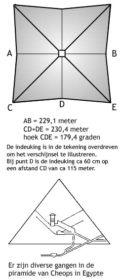 tekening van Cheops piramide (door Wouter Hagens)